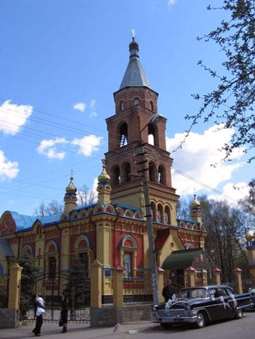 Собор Андрея Первозванного в Хмельницком